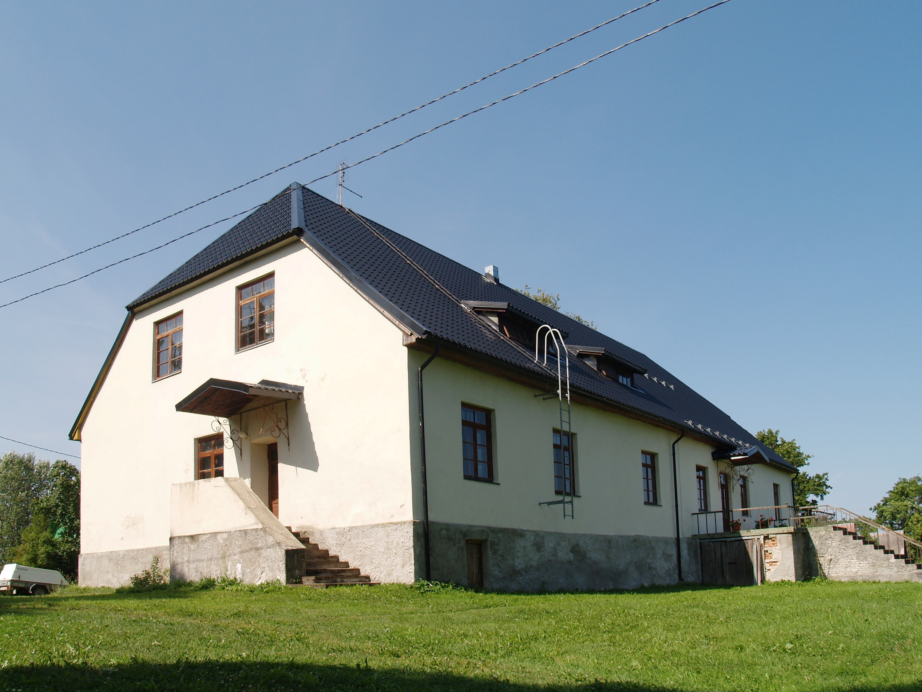 Kose pastoraat